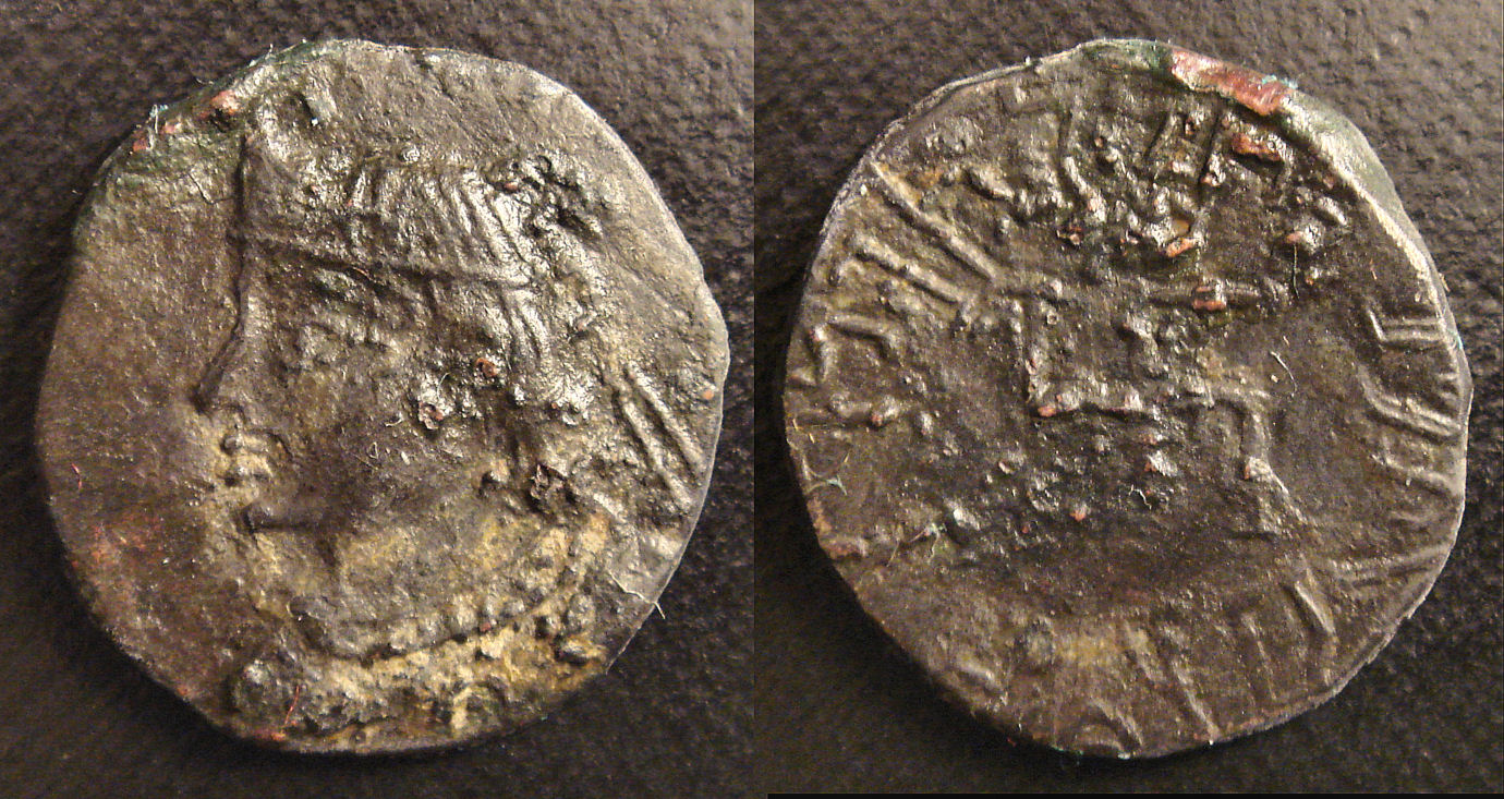 Parataraja Bhimarjuna, 3rd century CE, bi-drachm 1.70g